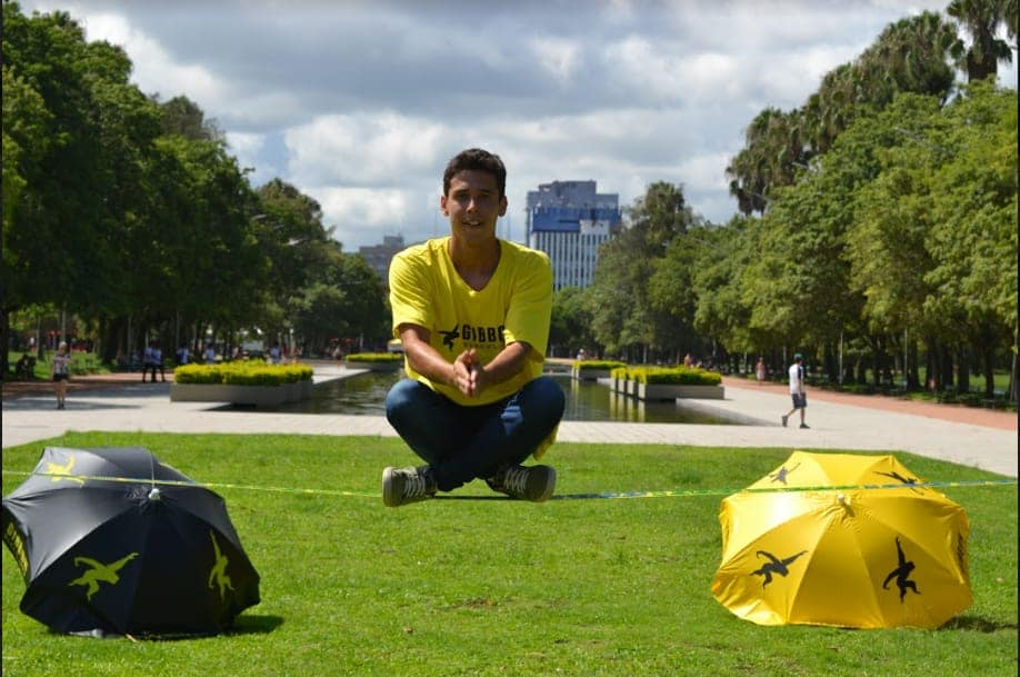 imagem de atleta